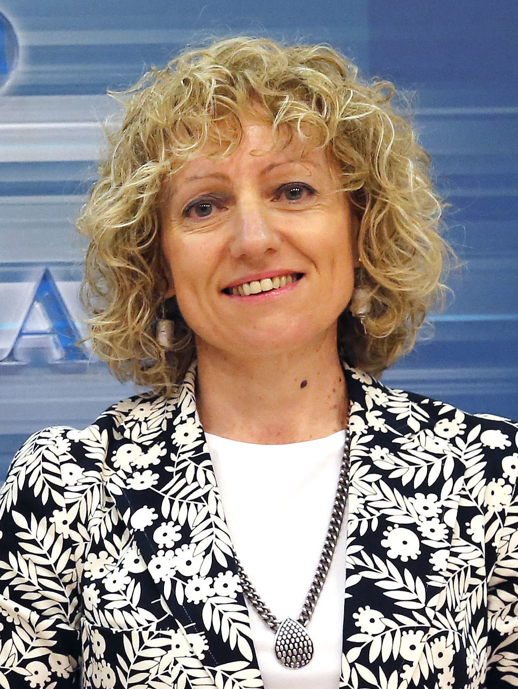 Esta mañana han tomado posesión tres altos cargos de la Consejería de Universidades e Investigación, Medio Ambiente y Política Social, y otros dos de la de Economía, Hacienda y Empleo